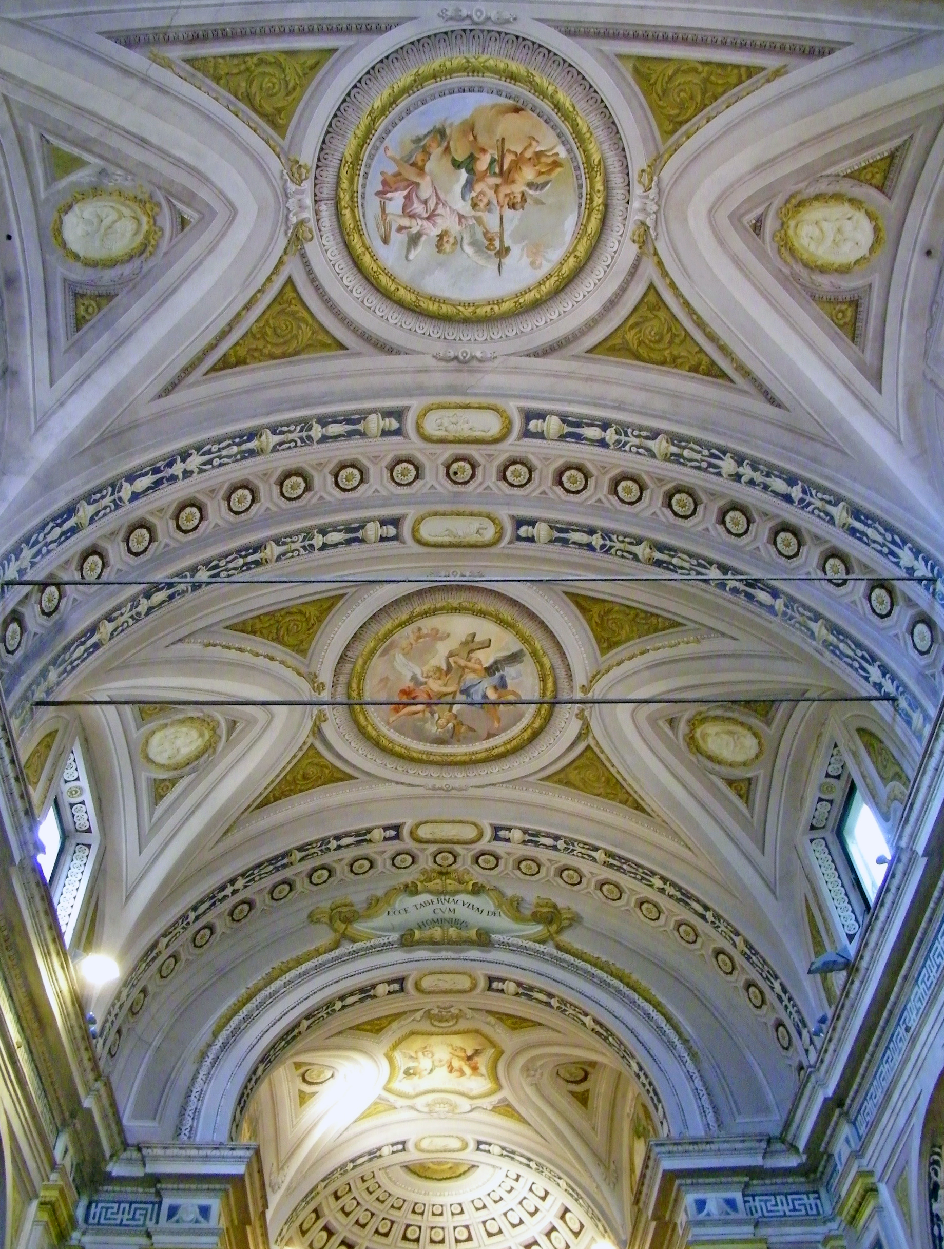 Oratorio di Santa Maria Assunta (Fontanellato) (soffitto)